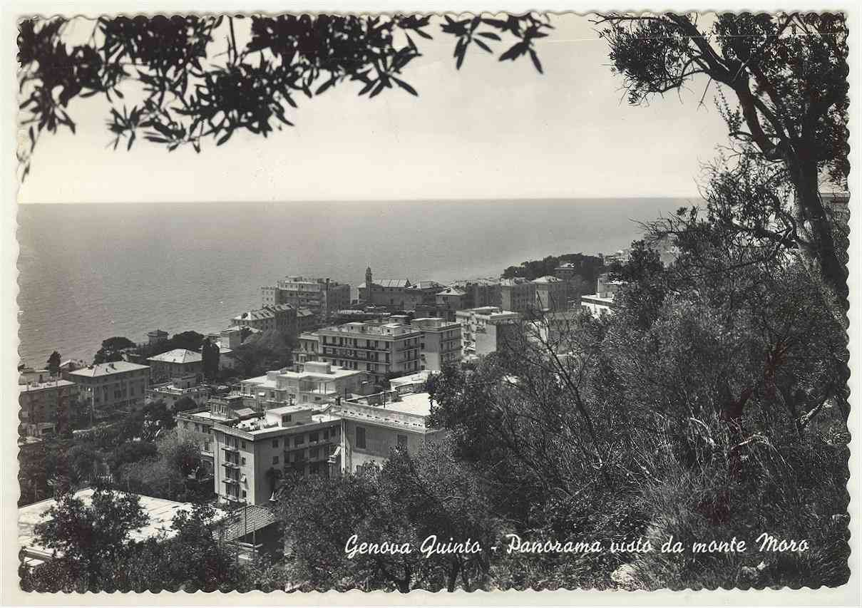 GE Genova Quinto al mare - panorama visto da monte Moro